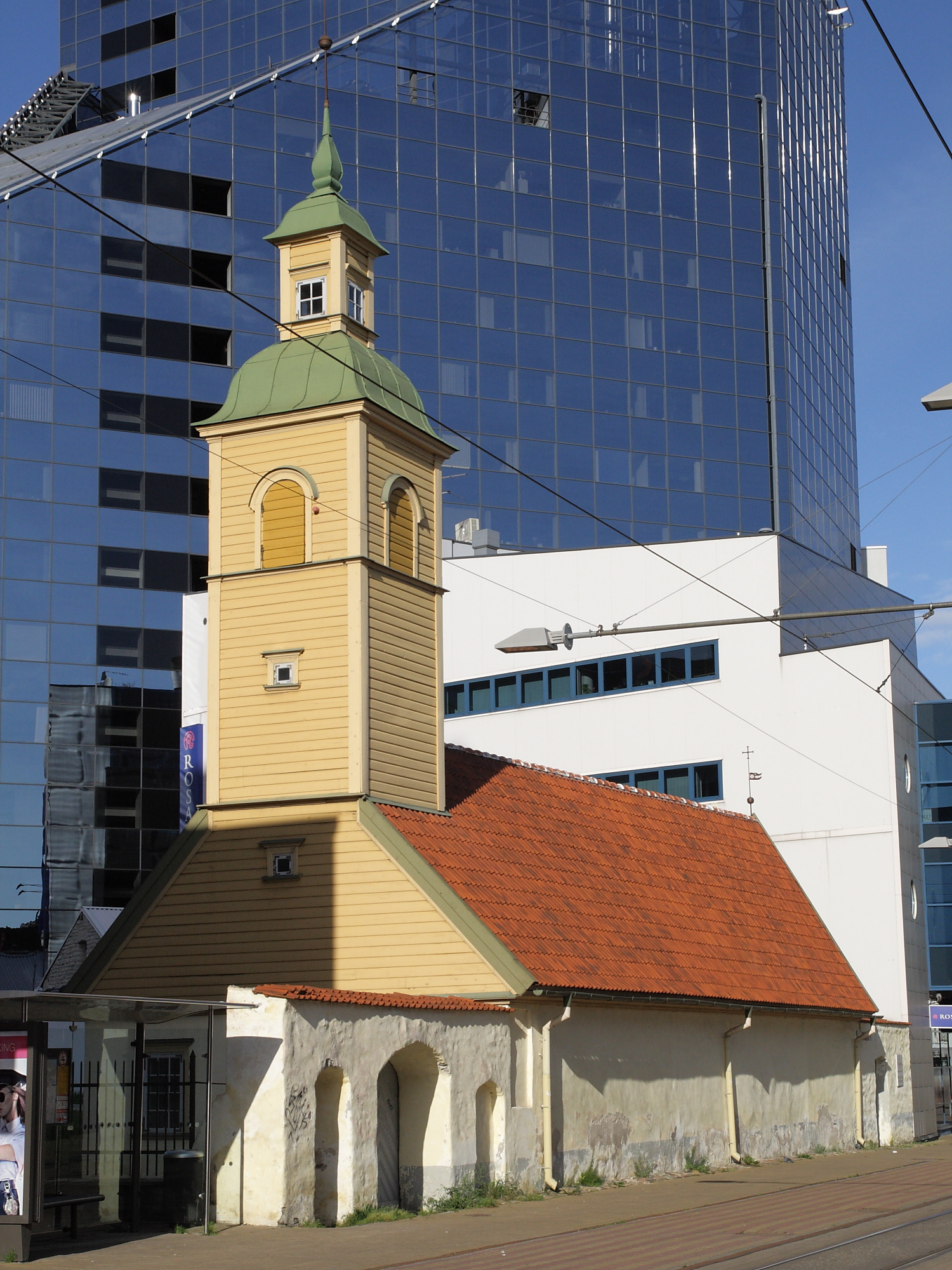 Tallinna Jaani Seegi kirik, 14. saj, 1648, 18. saj